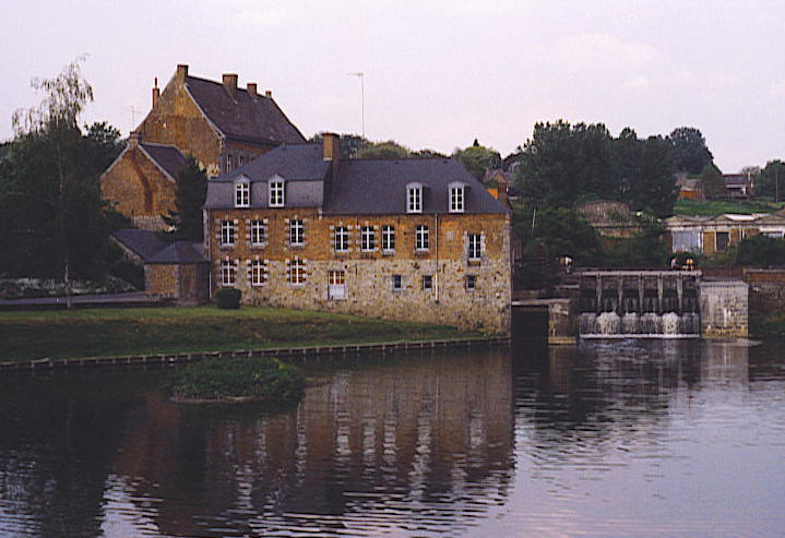 eigen foto - Watermolen van Maroilles op de Helpe Mineure